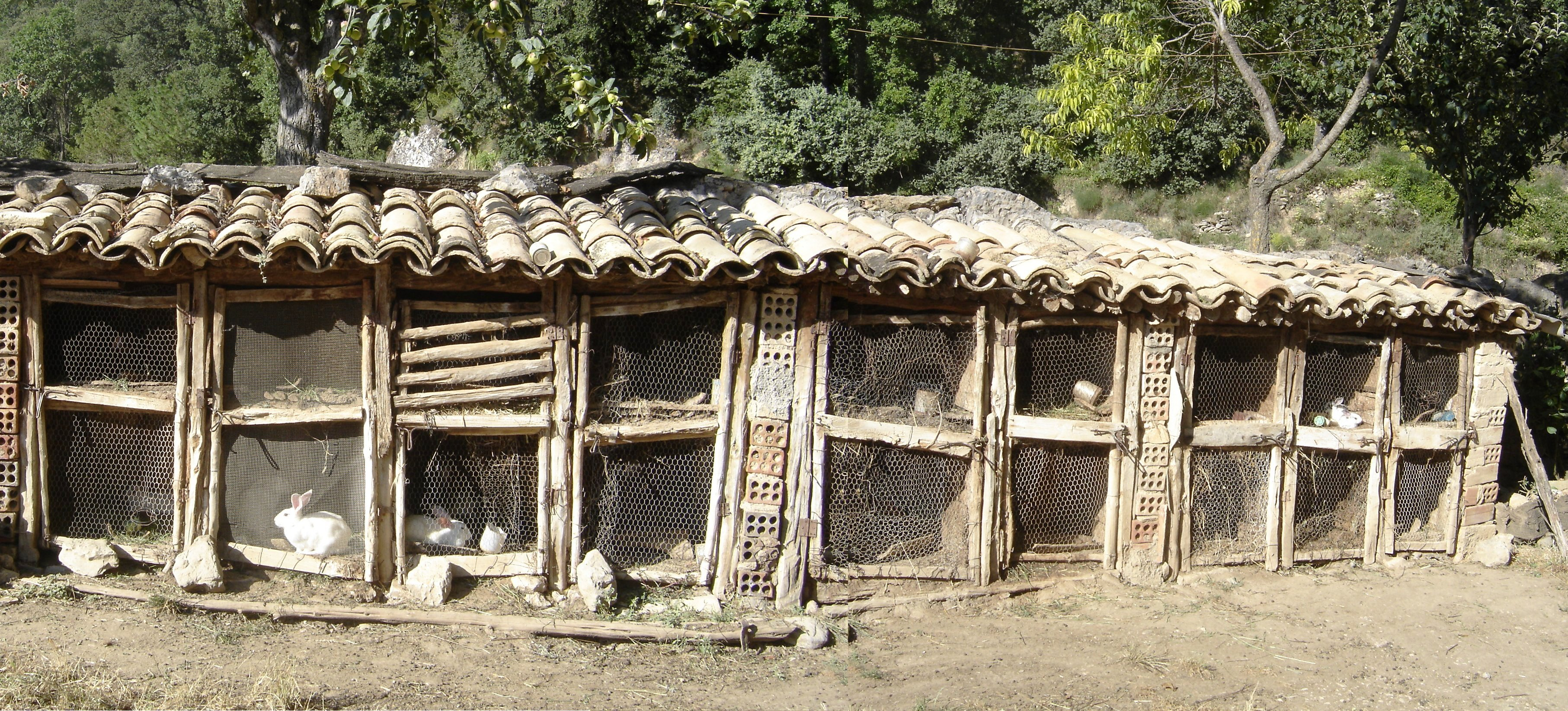 Les conilleres que hi ha a l'esquerra de la façana de la masia de Junyent (Odèn) (Solsonès).